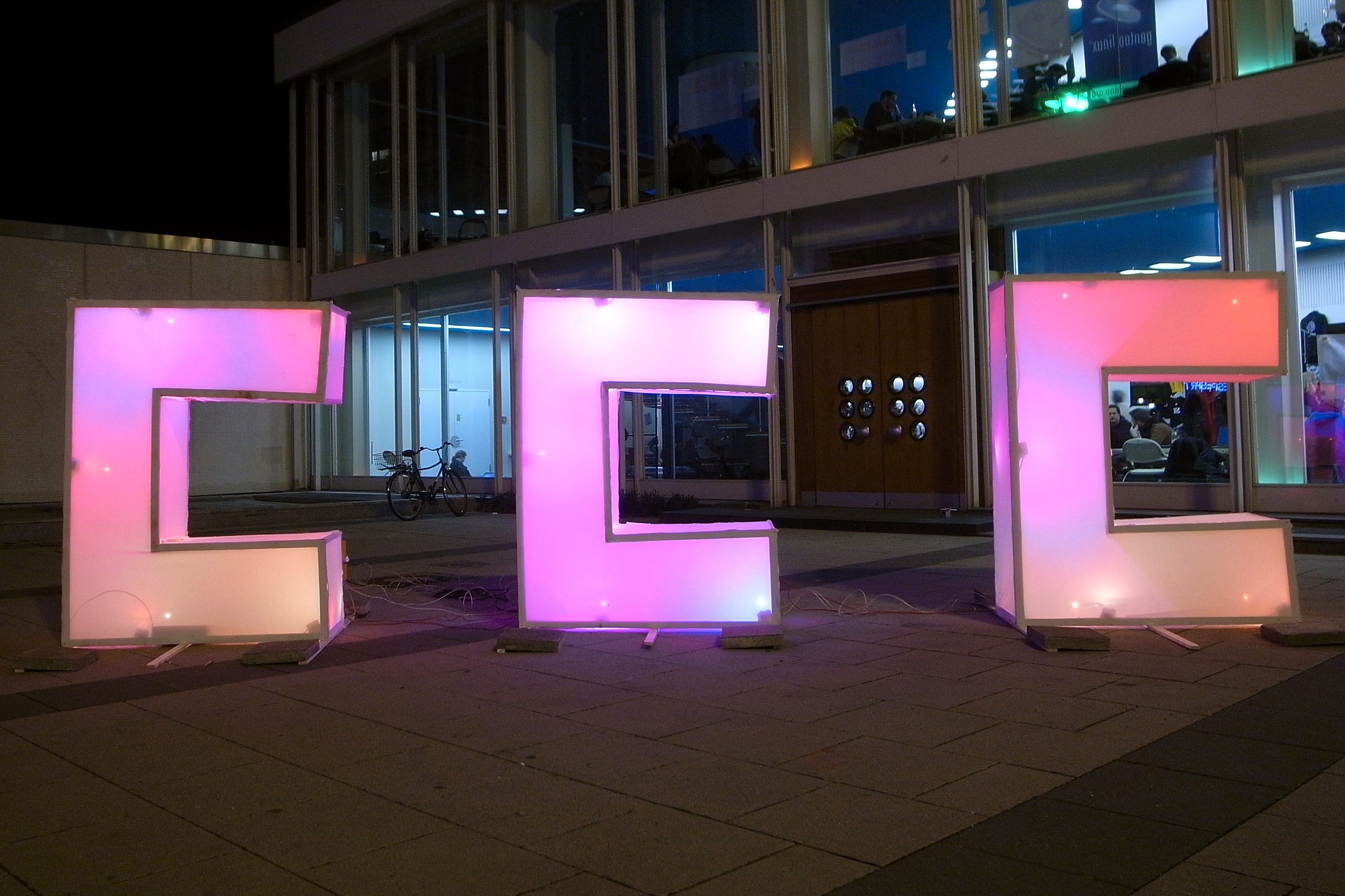 CCC-Leuchtbuchstaben Marke Eigenbau (µCCC) vor dem BCC zum 26C3, Berlin 2009.